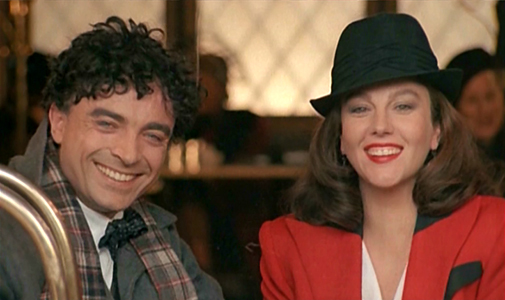 Képkocka „A kulcs” című filmből (Franco Branciaroli és Stefania Sandrelli)